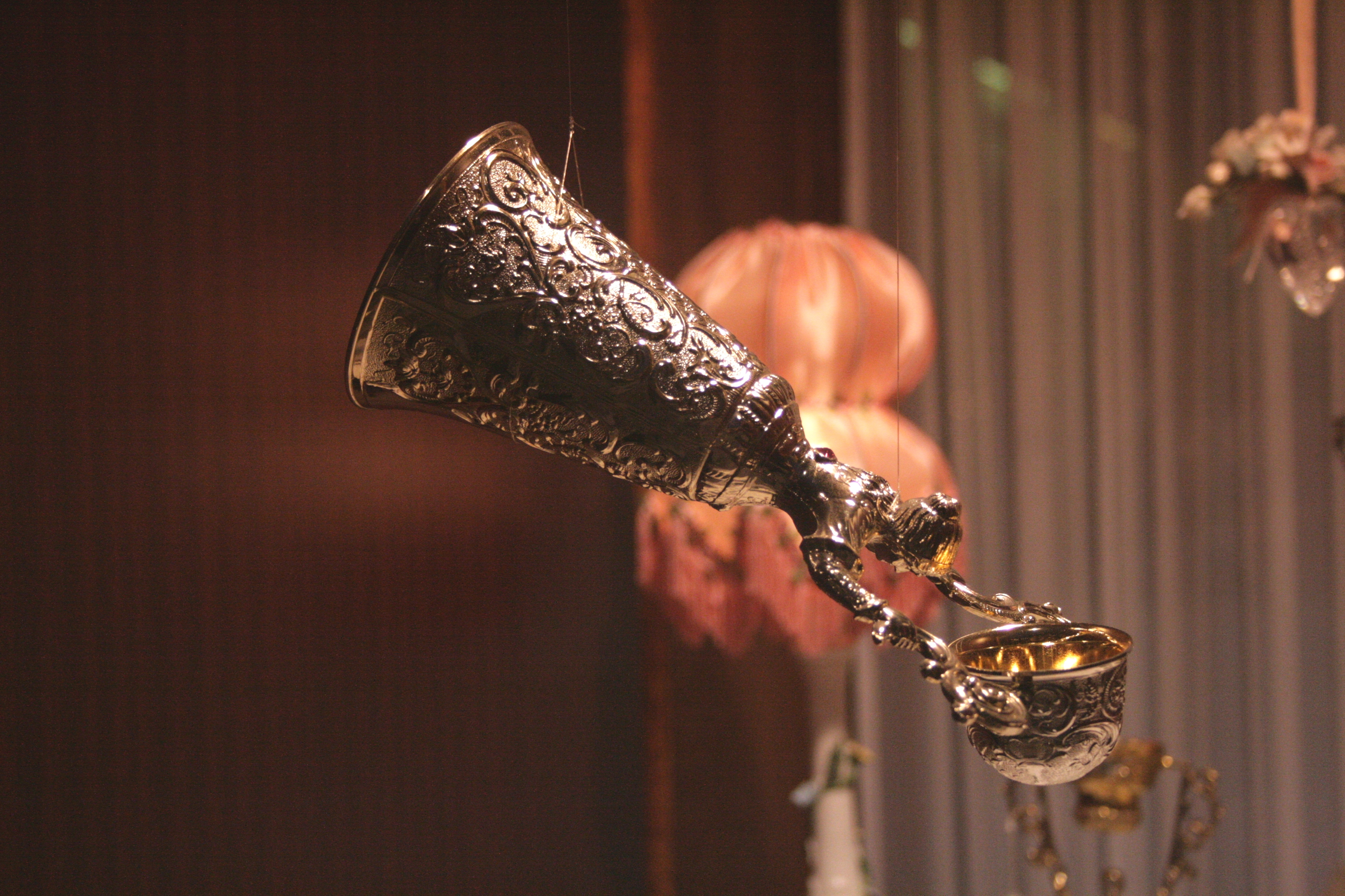 Goldschmiedekunst - Brautbecher (Goslar)